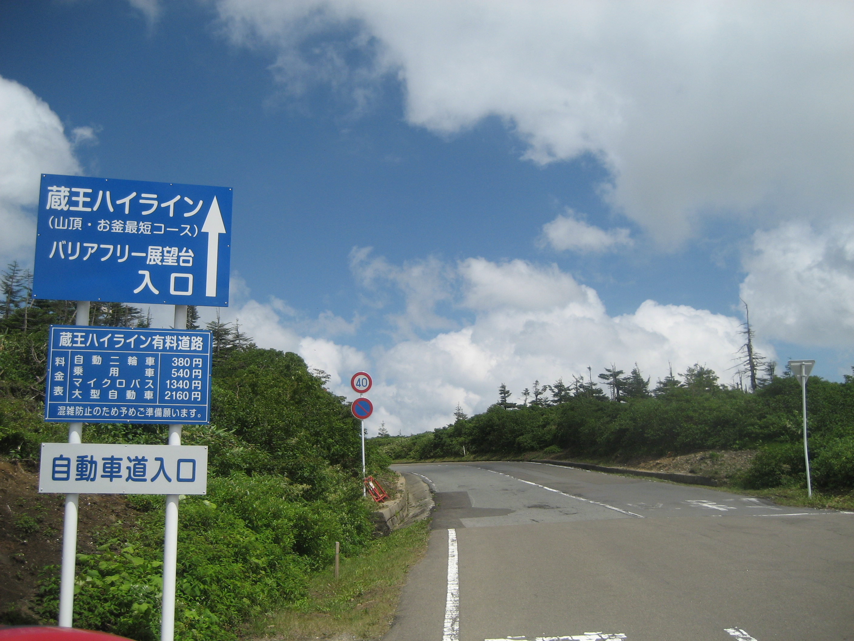 宮城県七ヶ宿町にある蔵王ハイライン入口付近（山形県側）